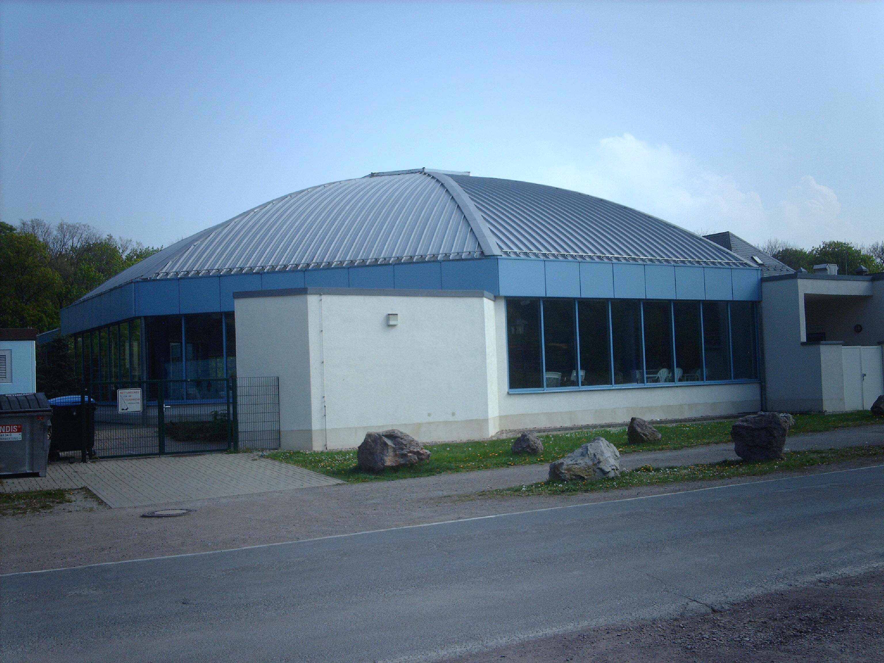 Schwimmbad in Arnstadt 2 (Wollmarkt)